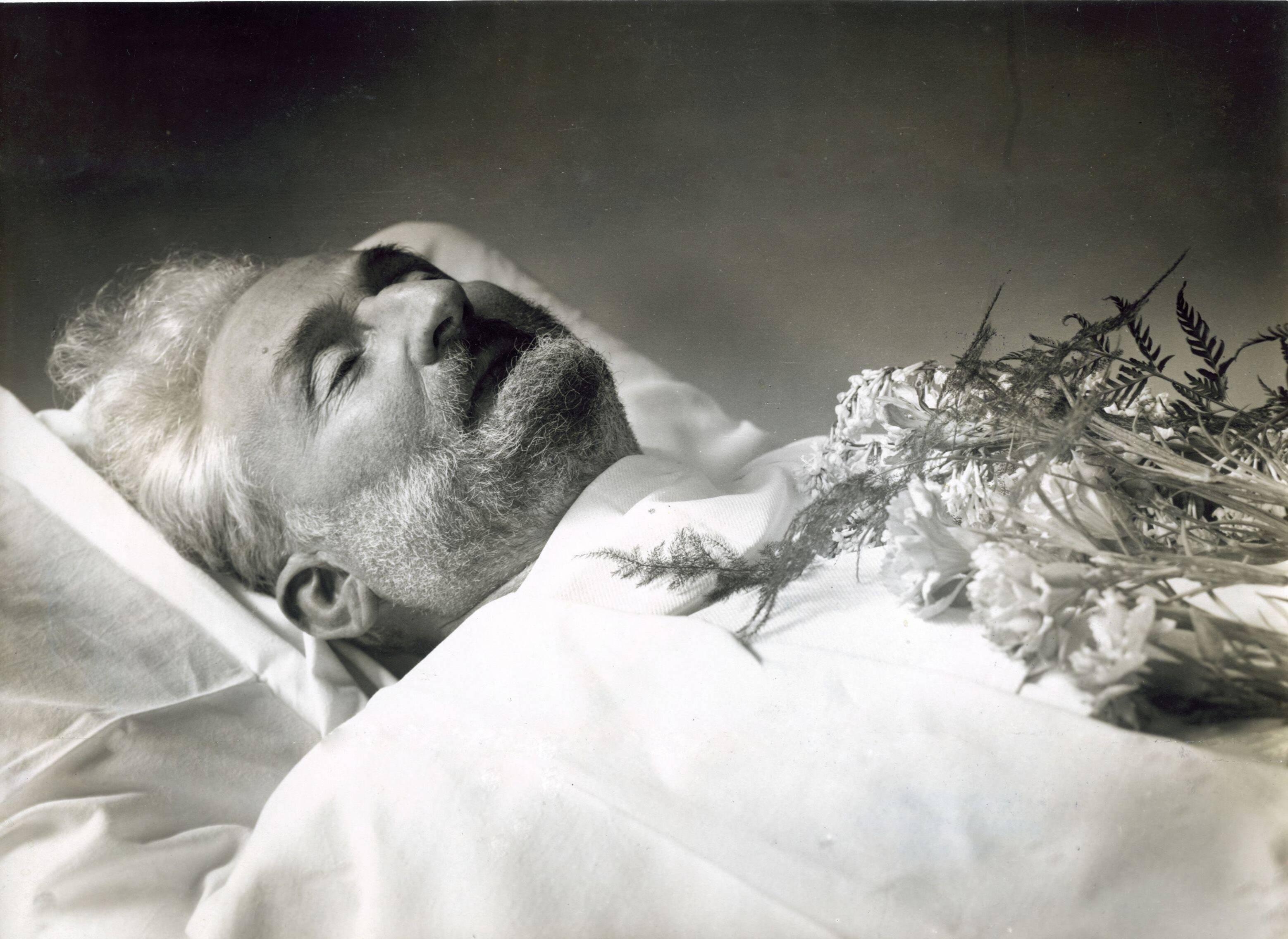 Architect K.P.C. de Bazel op zijn doodsbed. Hij overleed in 1923 op weg naar de uitvaart van zijn jongere collega M. de Klerk. 1923.